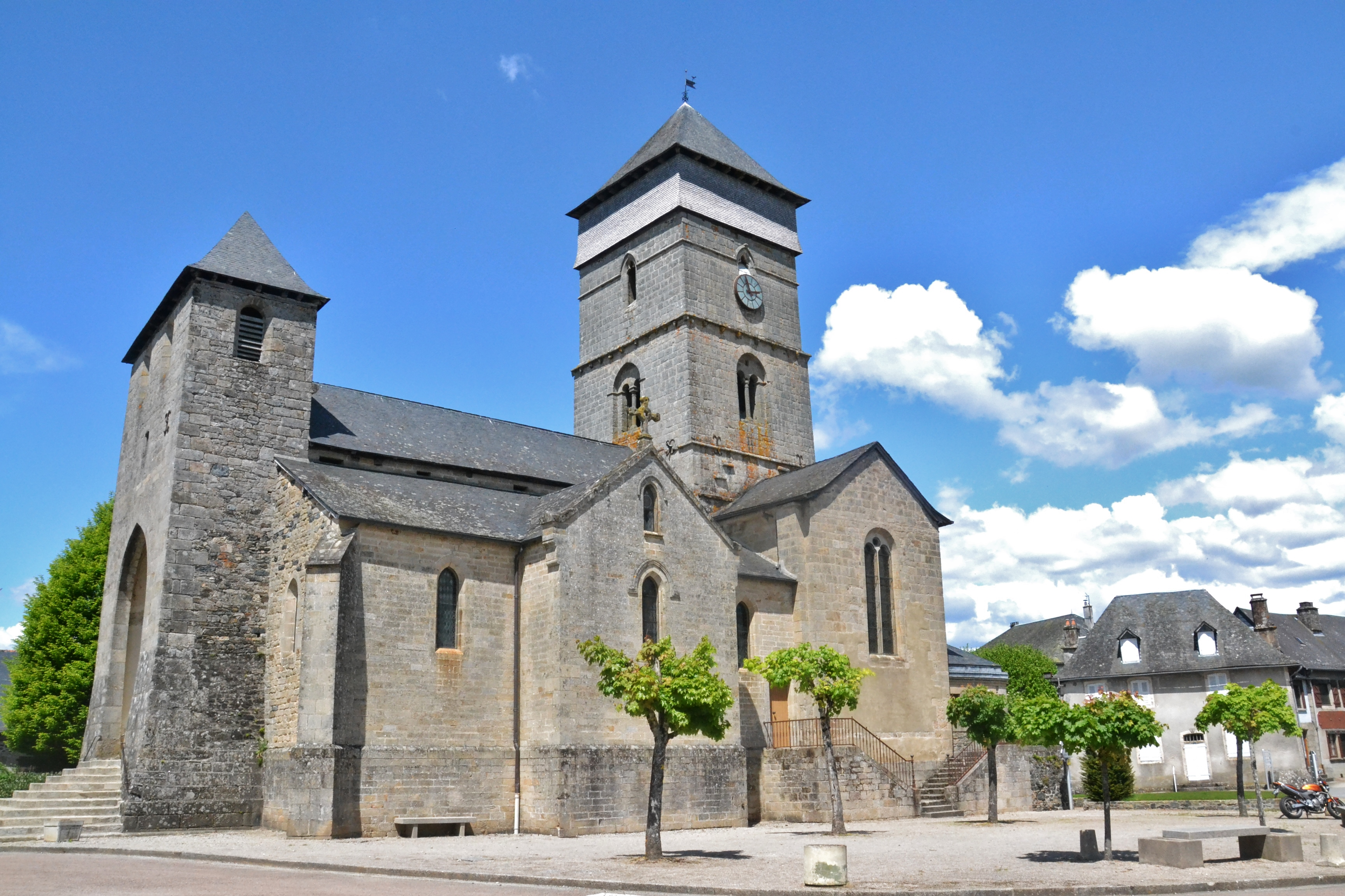 L'église Saint-Côme-et-Saint-Damien de Chamboulive (Corrèze, France)